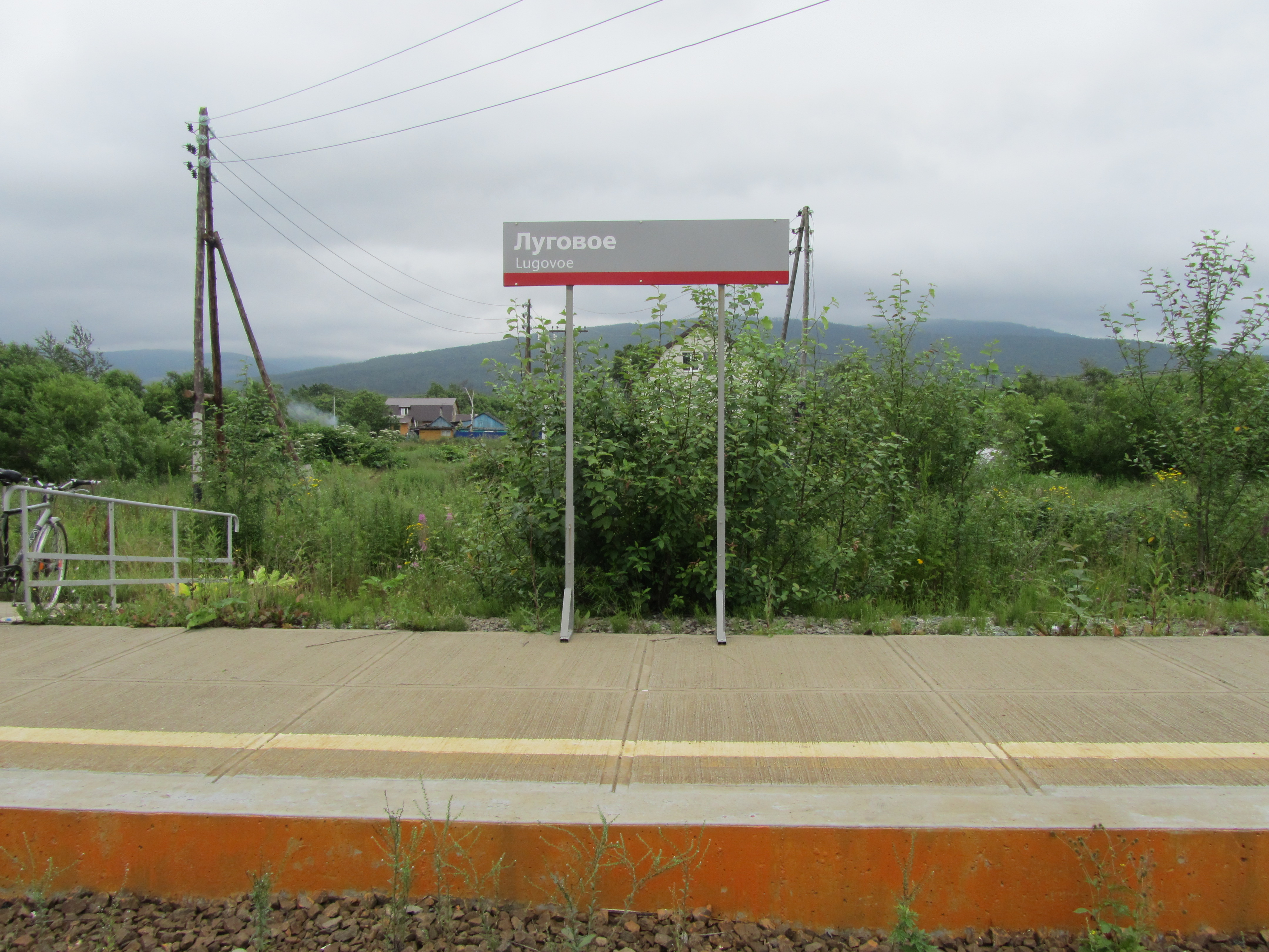 Станция Луговое Сахалинского региона дальневосточной железной дороги